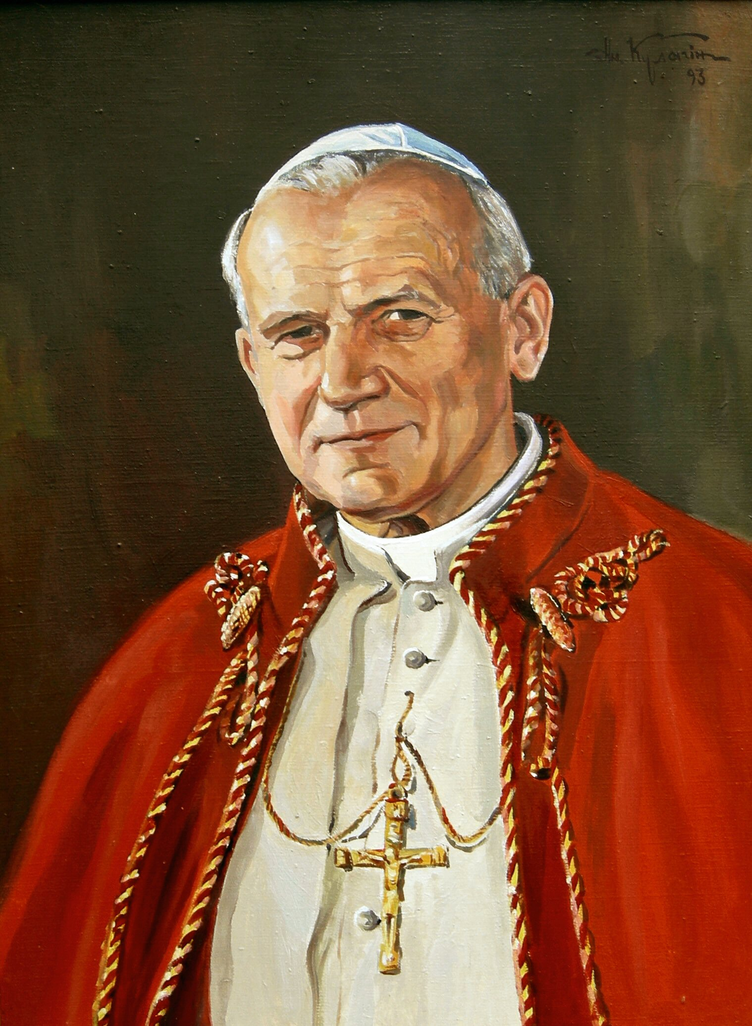 холст,масло,80х60 см, 1993г.,на вечном хранении в библиотеке Ватикана